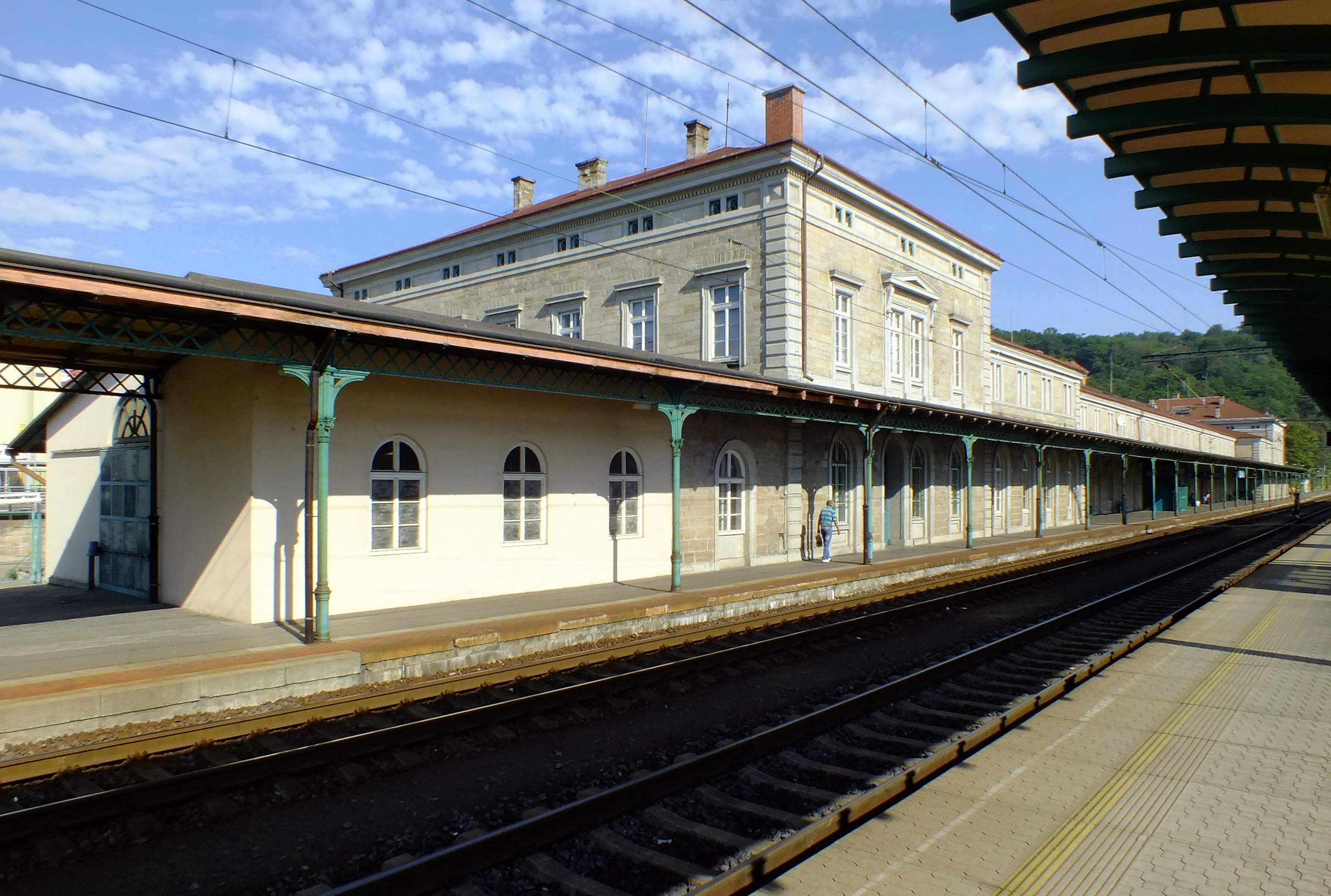 Nadraží Děčín hlavní nádraží